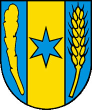 Wappen von Tschiertschen-Praden, Kanton Graubünden, Schweiz